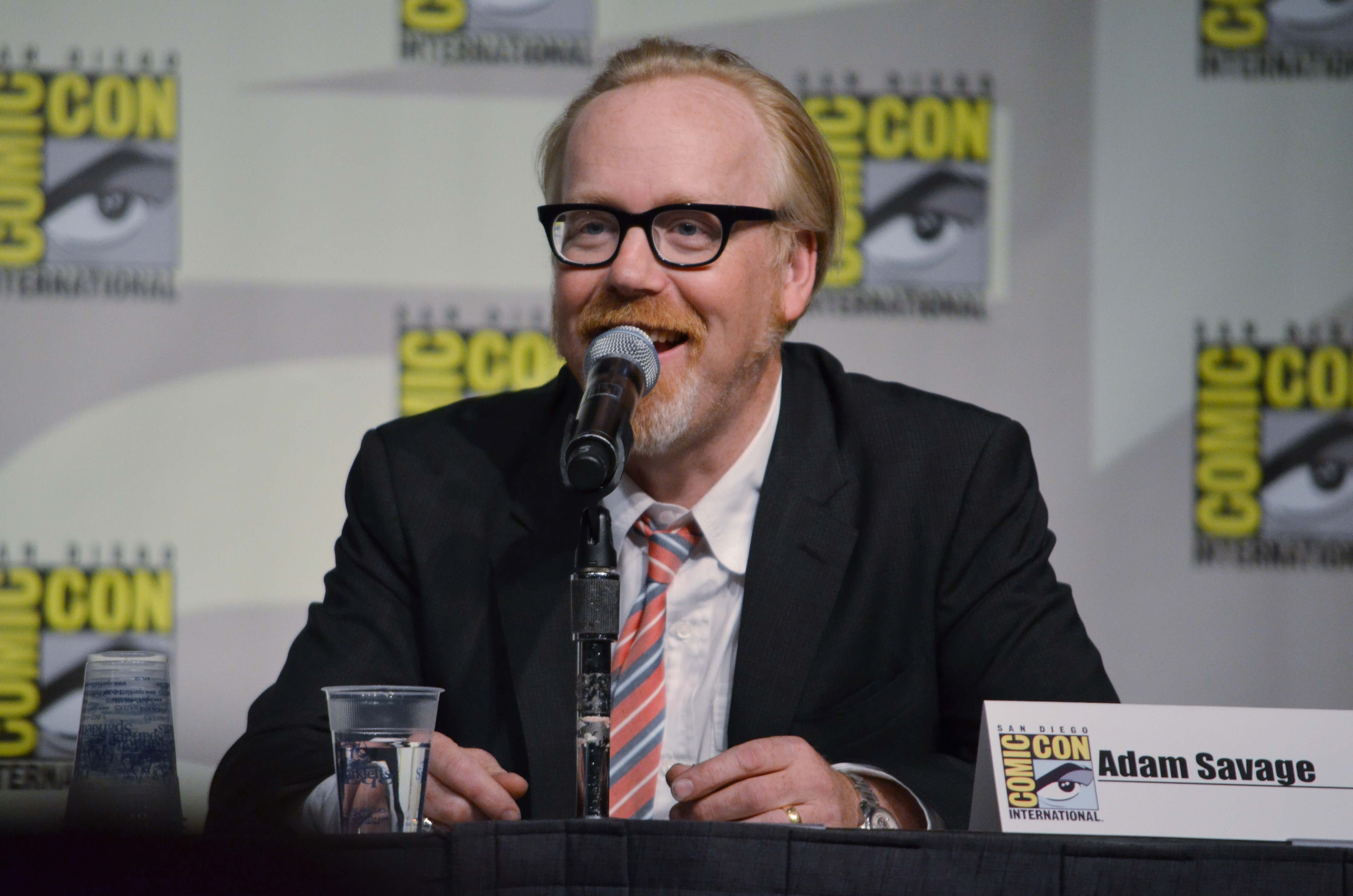 Adam Savage, Mythbusters